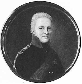 Matwei_Ivanovich_Lamsdorf(1745—1828)